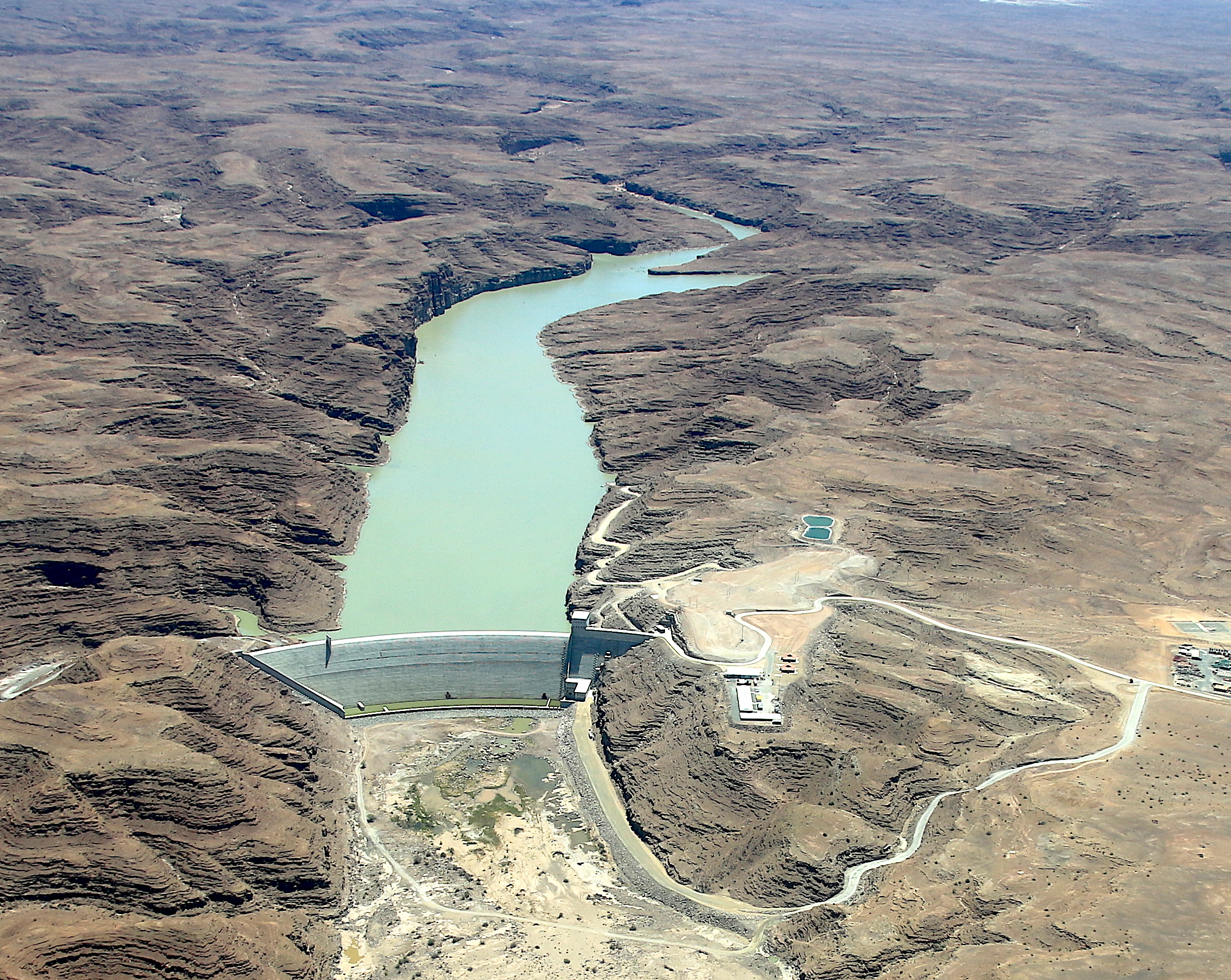 Neckartaldamm (2019)